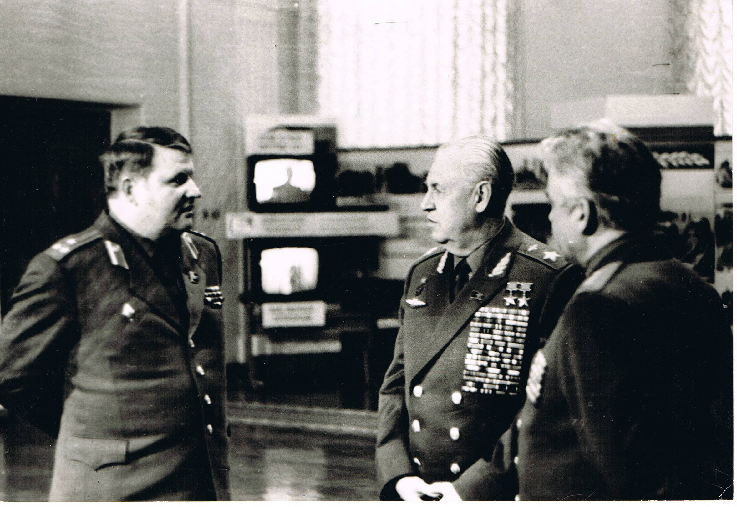 Маршал авиации Ефимов А.Н. с комдивом Дорофеевым А.А. и командующим войсками СКВО Шустко Л.С.